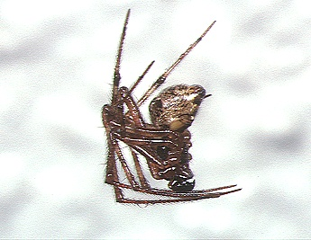 male Parasteatoda tepidariorum from Okinawa.